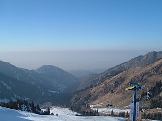 Sjimbúlak, Kasakstan